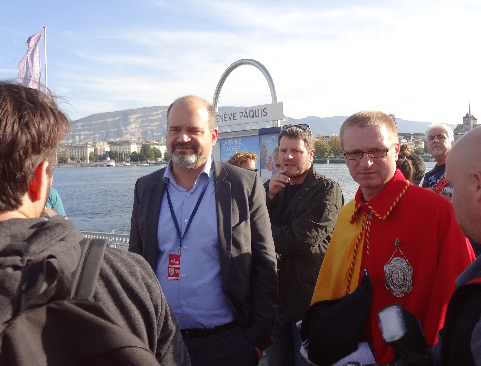 « Le chevalier du temps perdu » va débarquer à la rotonde des Pâquis. Le conseiller administratif Sami Kanaan et l'huissier en tenue son dans l'attente de son arrivée.